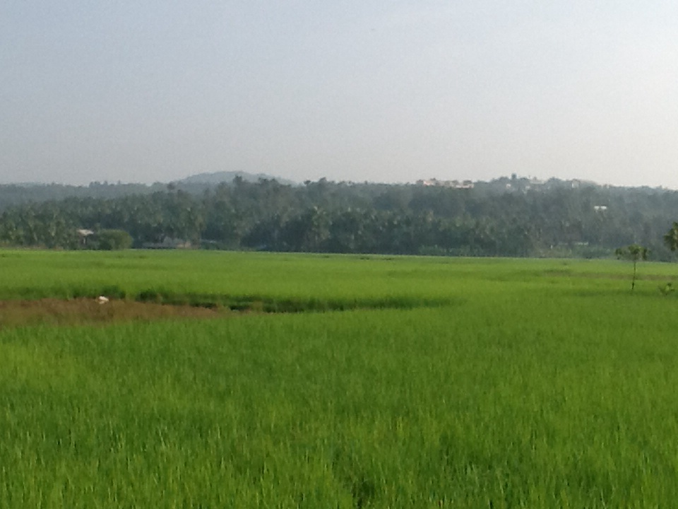 Alungal pulikkal kondotty malappuram kerala india